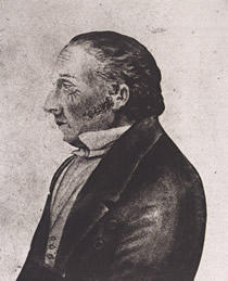 Juan de Sámano por José María Espinosa : Acuarela sobre papel, reproducida en una tarjeta de visita.